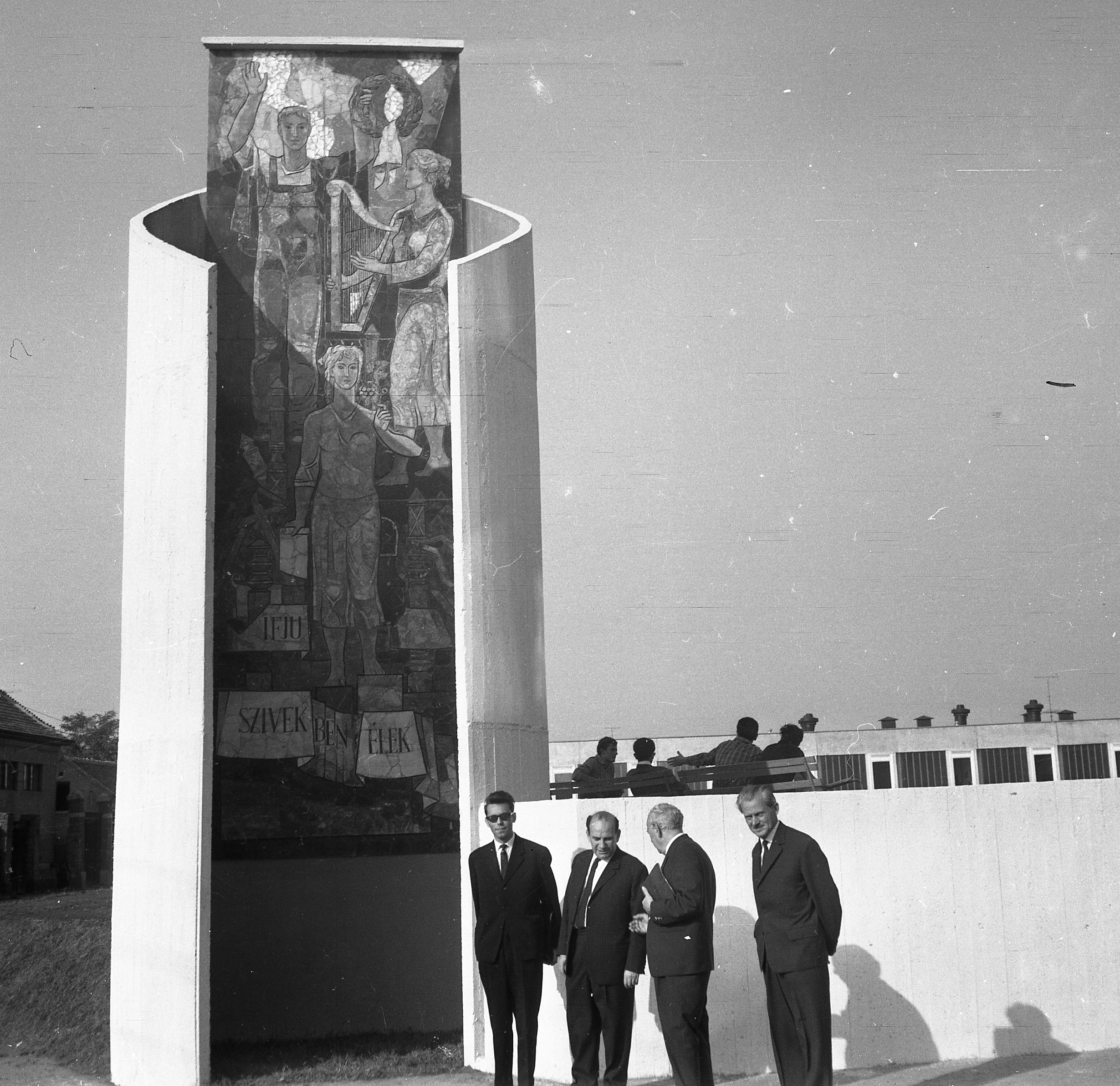 Ybl Miklós Műszaki Főiskola (ma: Debreceni Egyetem Műszaki Kar) Virág utcai oldalán található Ifjú szívekben élek című hímeskő kompozíció (Mattioni Eszter, 1964.). - kép egy Ady-verssor gondolatából merítette témaötletét: „Ifjú szívekben élek". A temető talajából hárfázó nőalak emelkedik elő az élet, az ismeretek szőlőindájával.... (kozterkep.hu) Location: Hungary, Debrecen Tags: modern architecture Title: Ybl Miklós Műszaki Főiskola (ma: Debreceni Egyetem Műszaki Kar) Virág utcai oldalán található Ifjú szívekben élek című hímeskő kompozíció (Mattioni Eszter, 1964.).